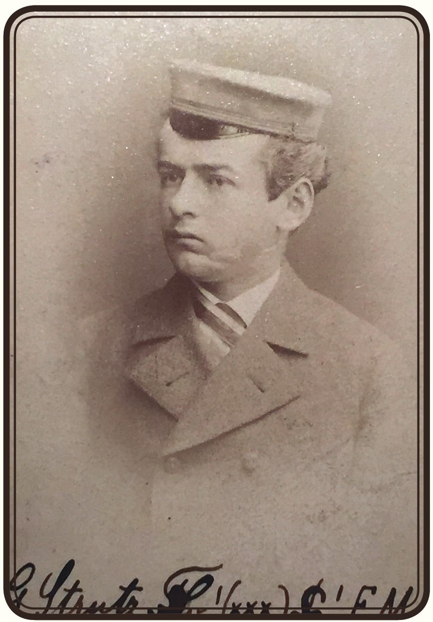 Porträtfotografie von Georg Strutz